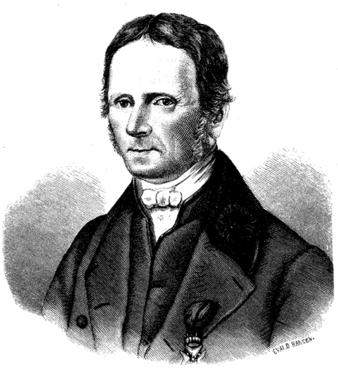 Swedish entomologist Carl Johan Schönherr. Image published in Svenska Familj-Journalen 1881